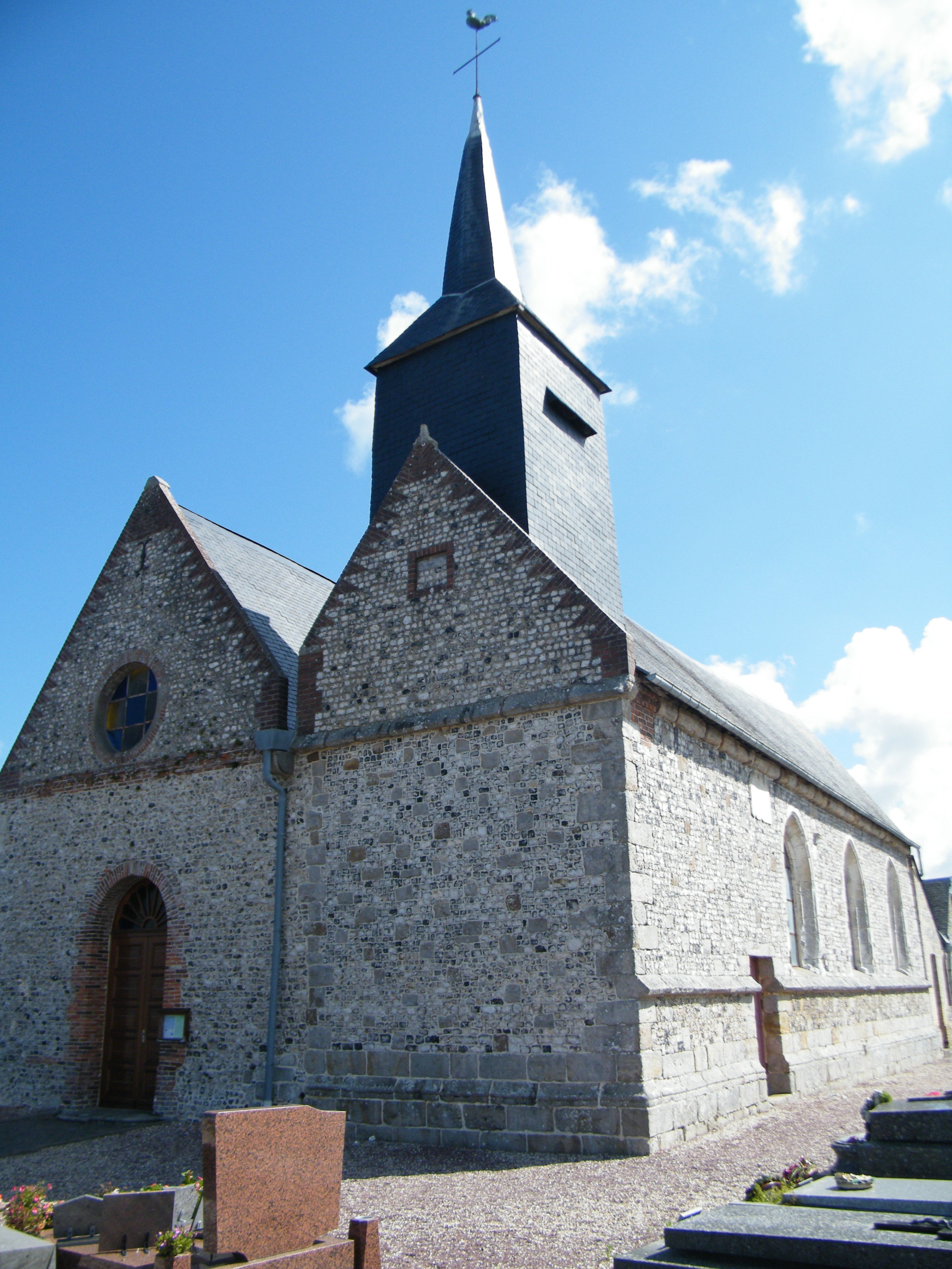 Glicourt, Seine-Maritime, France, église